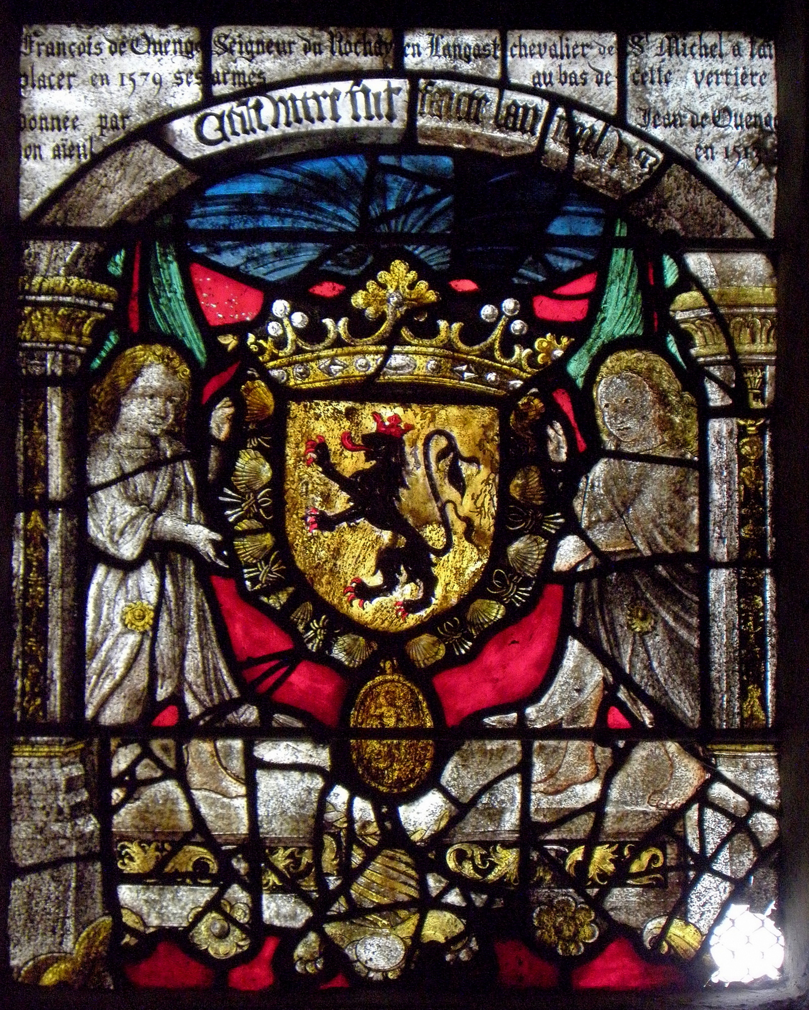 Maîtresse-vitre de l'église Saint-Gal de Langast (22). Détail.